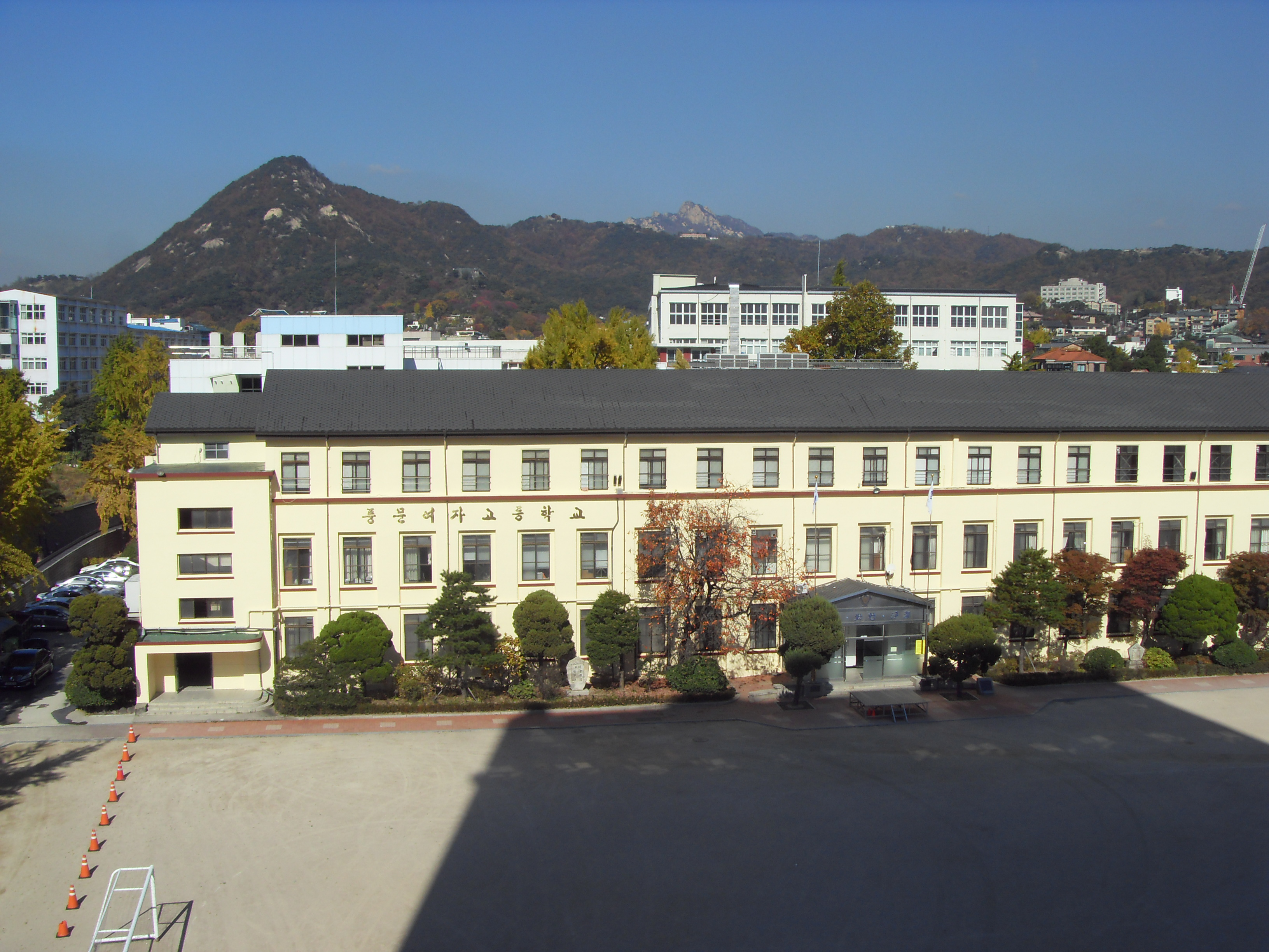 풍문여자고등학교